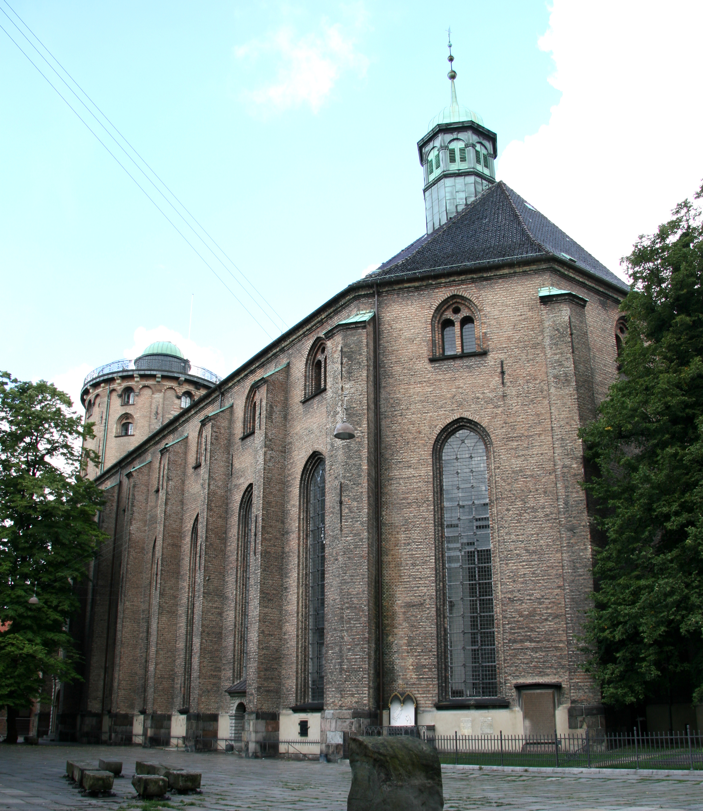 Trinitatis Kirke, Copenhagen, Denmark. Set fra sydøst.